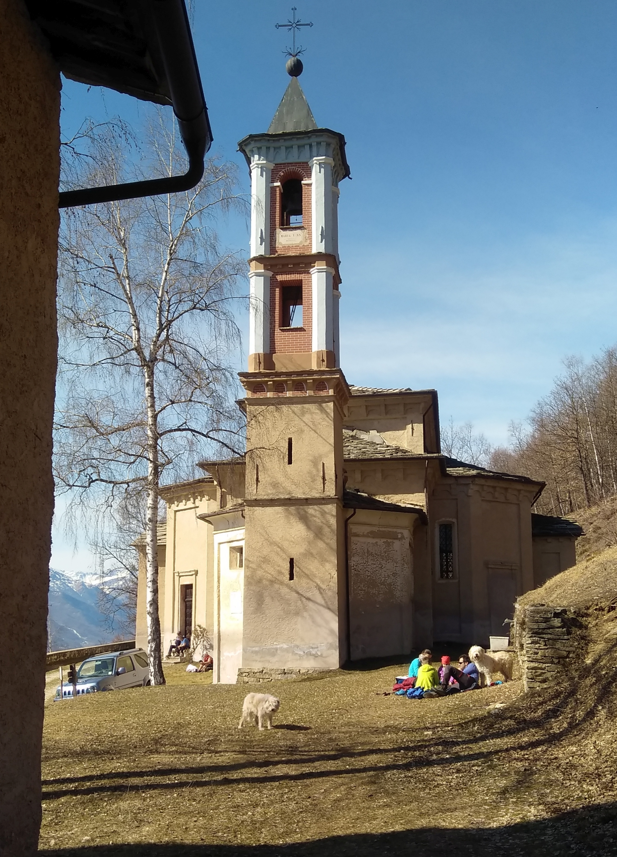 Santuario della Madonna della Betulla (Val Variata, CN), il campanile